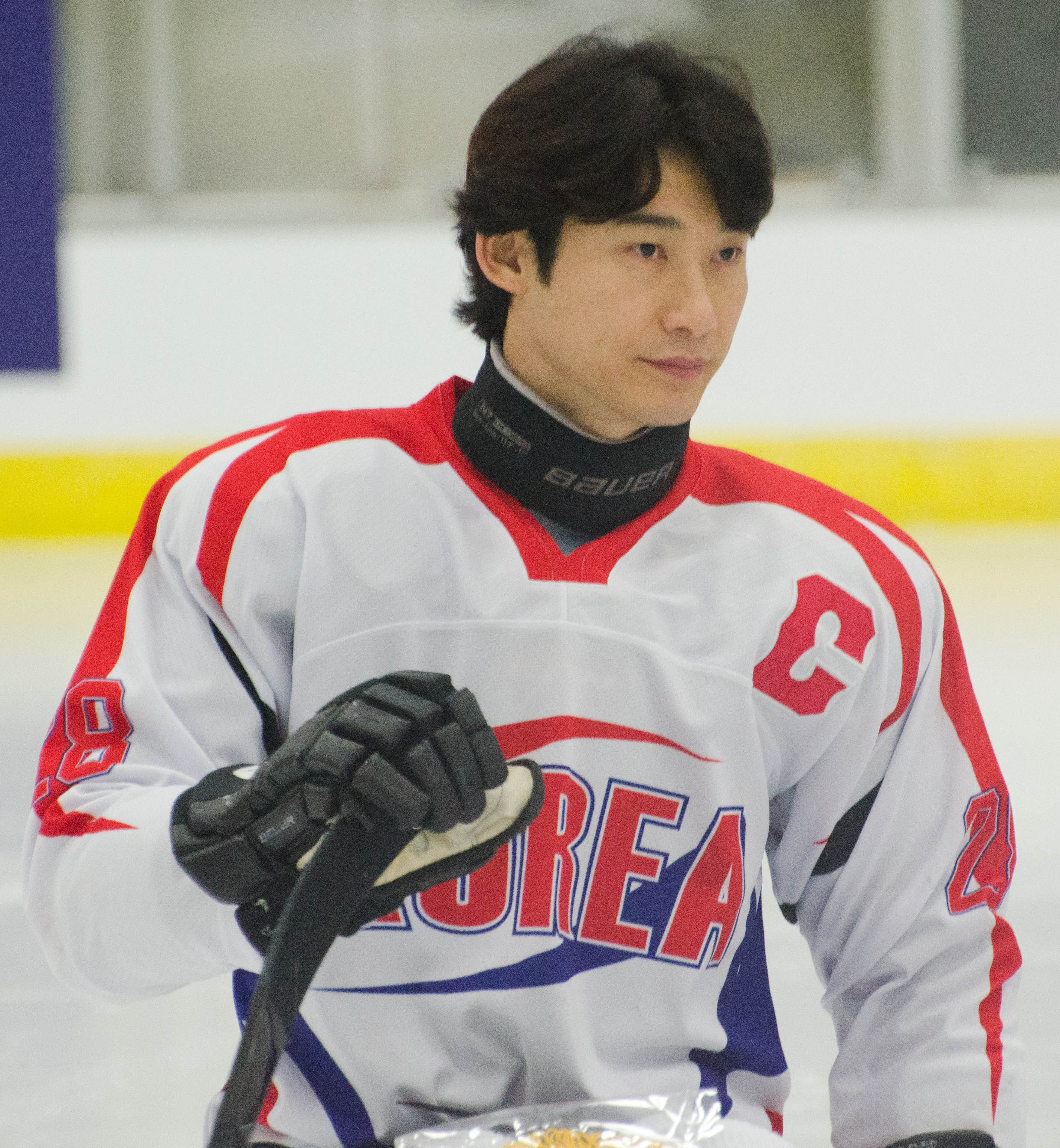 Lee Jong Kyung, 2015